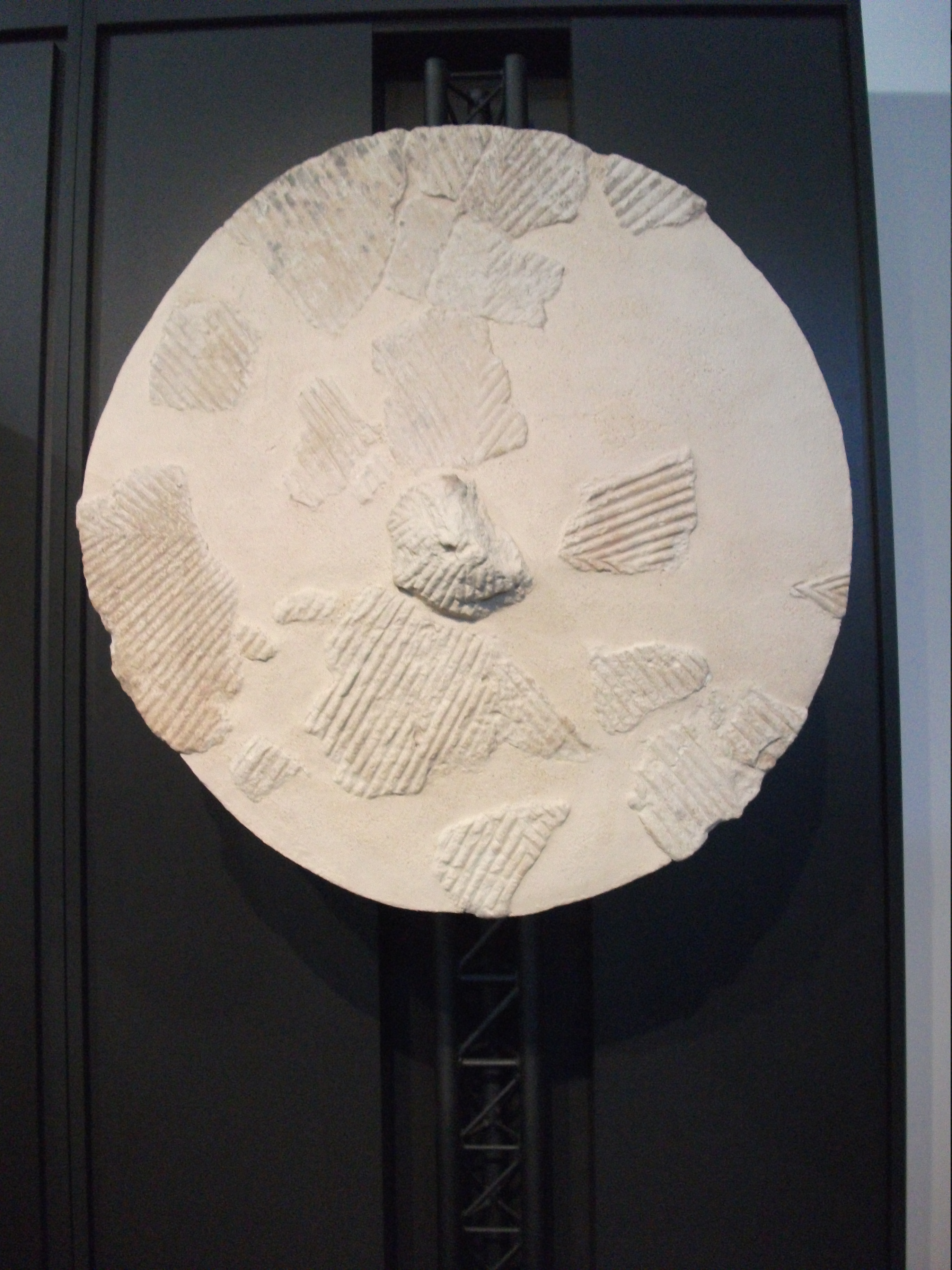 Scultura, Gigante Monte Prama, Scudo, Sardegna, Italia civiltà nuragica, preistoria, archeologia, età del bronzoUnknownUnknown sculpture, giant of monte prama, shield, sardinia, italy, nuragic civilization,archaeology, bronze age